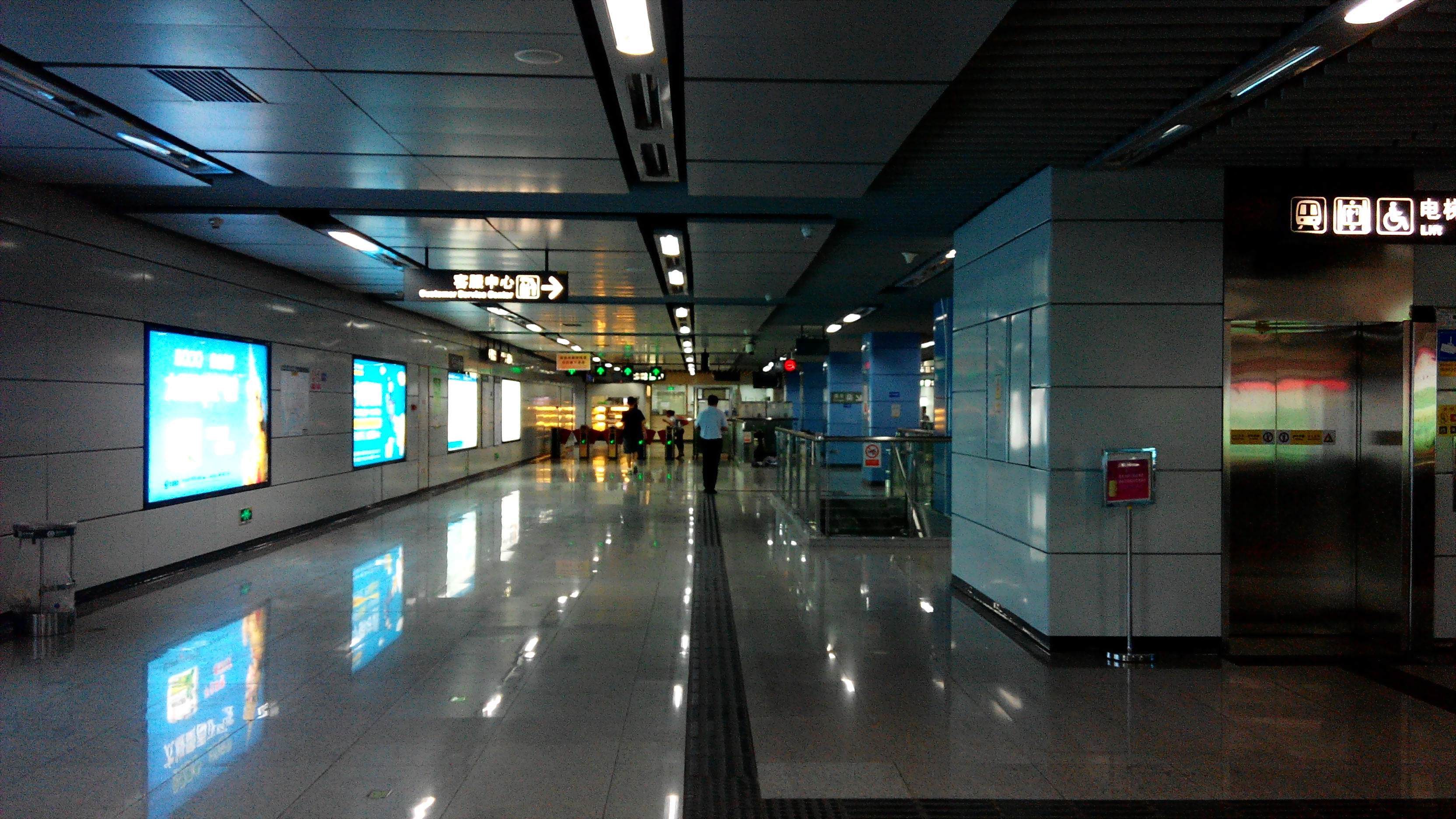 深圳地铁1号线 新安站 大堂